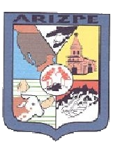 Escudo del municipio sonorense.